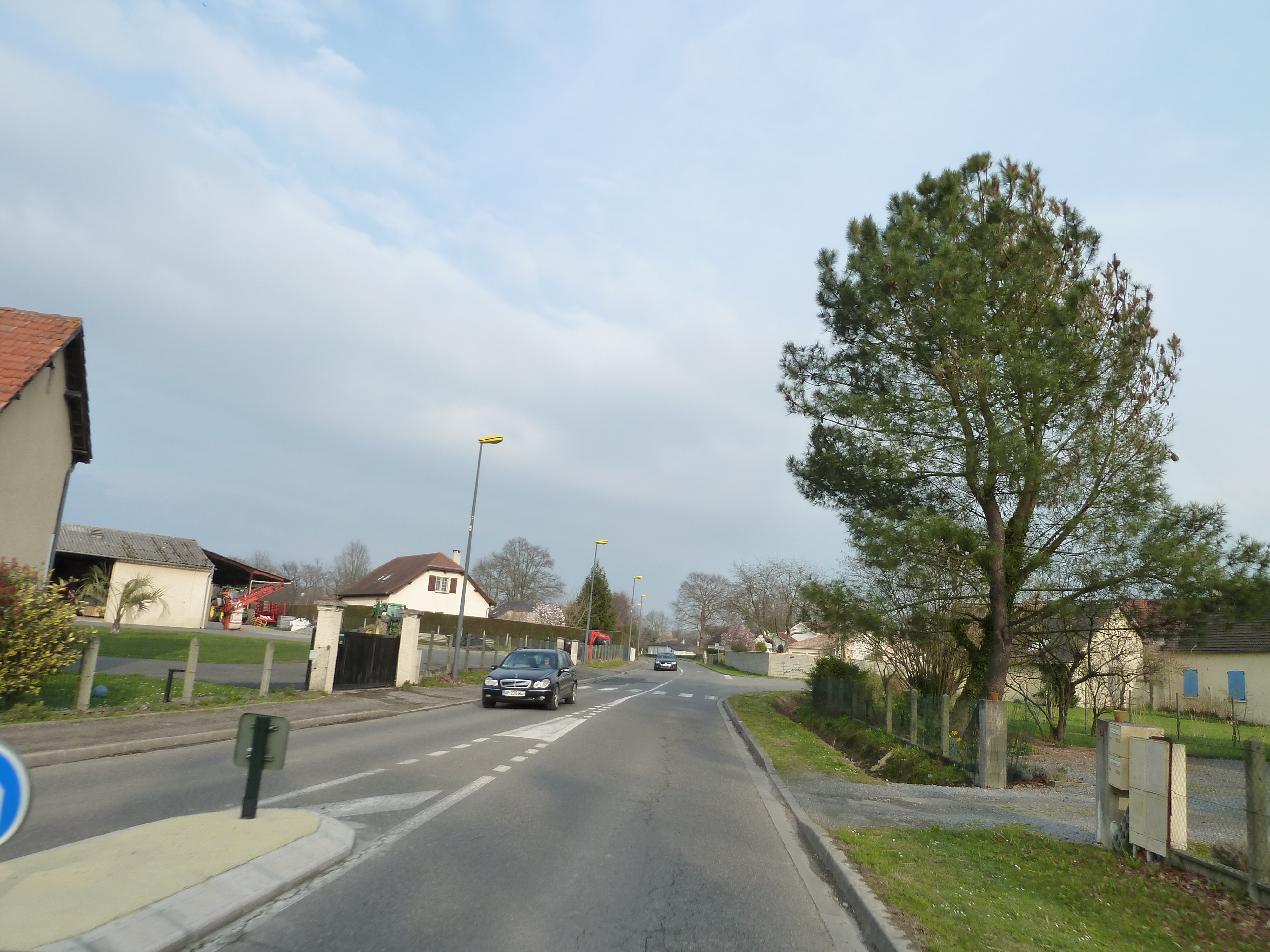 Montardon